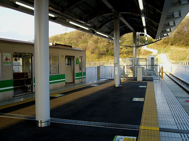 近鉄けいはんな線 学研奈良登美ヶ丘駅 ホーム東端 けいはんな線末端部